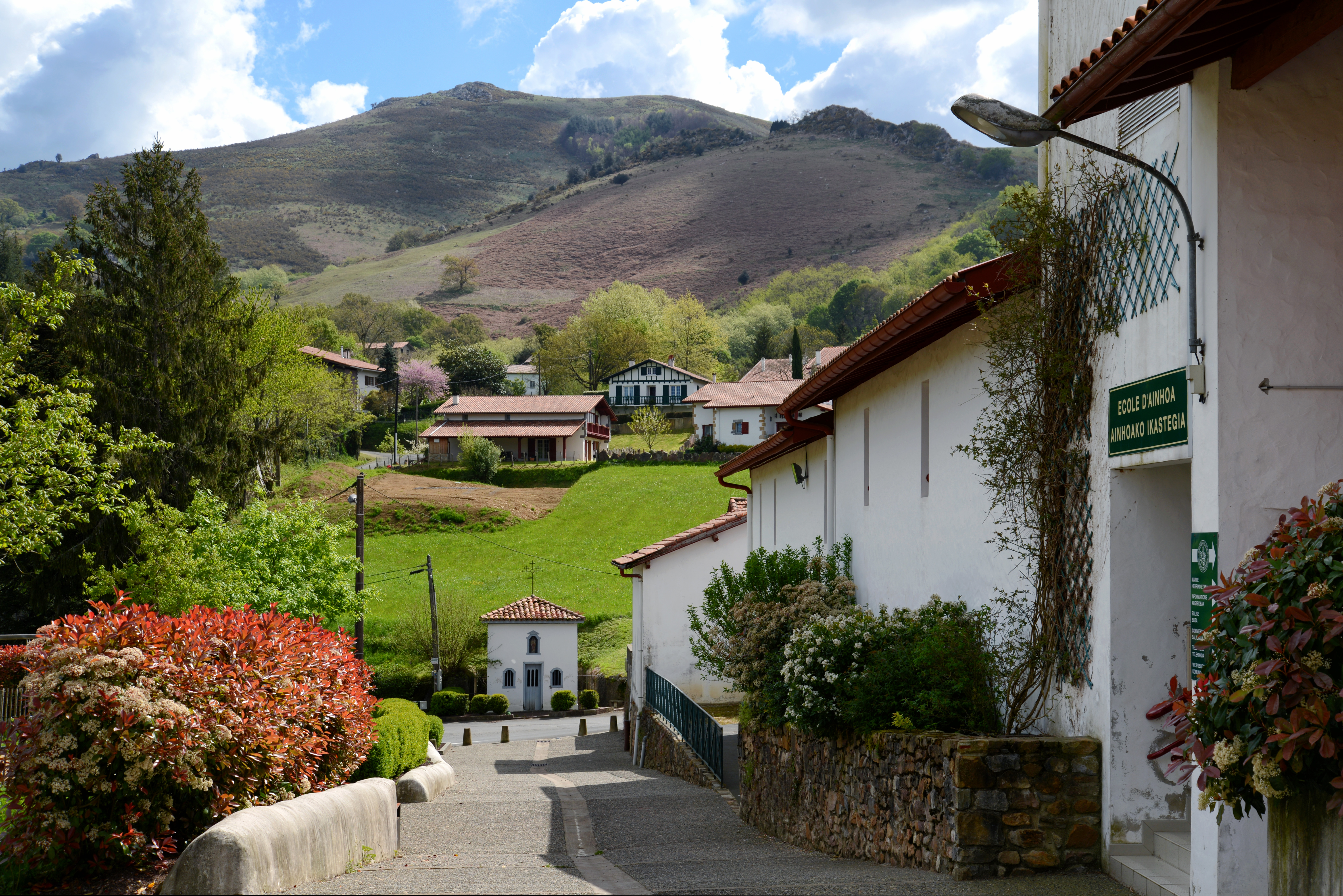 Ainhoa, Pyrénées-Atlantiques (Aquitaine) - L'école primaire publique et sa rue